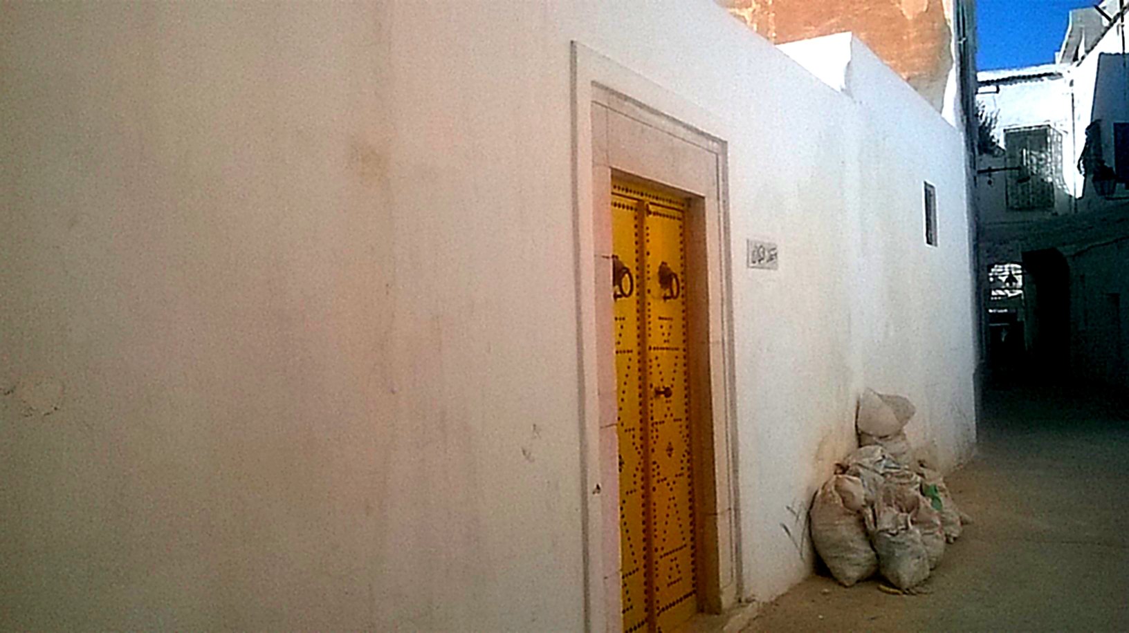 Bab Souika باب سويقة